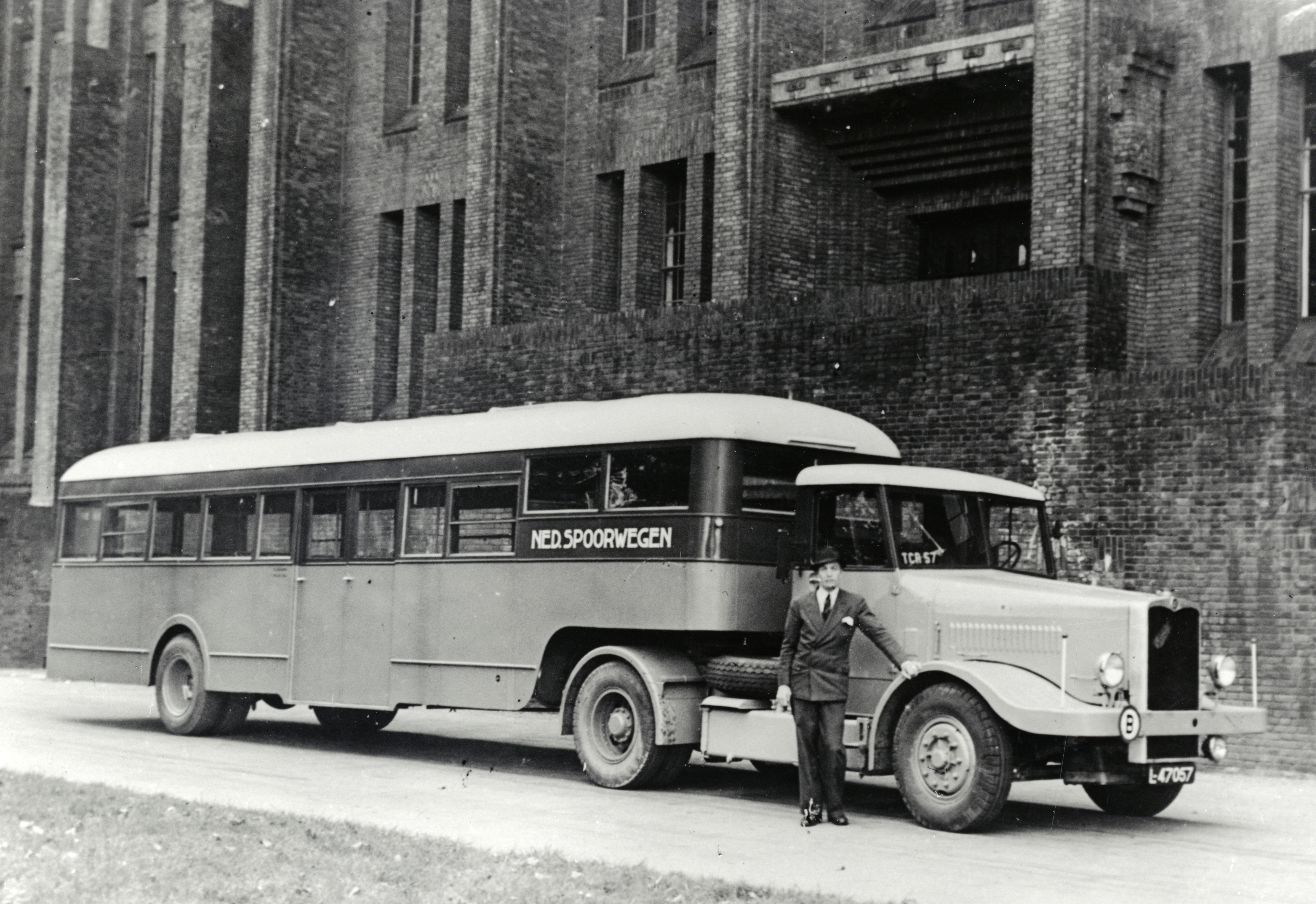 Afbeelding van een Crossley opleggerbus van de N.S. bij het 3e Administratiegebouw van de N.S. (HGB III, Moreelsepark) te Utrecht. N.B. De opleggerbussen werden tijdens en kort na de Tweede Wereldoorlog ingezet op trajecten waar geen spoorverkeer mogelijk was.